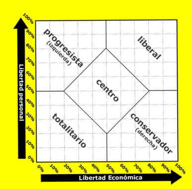 Diagrama de Nolan sin giro de 45°